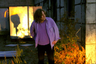 Søren Nørregaard fra Janes Rejoice kigger mod venstre